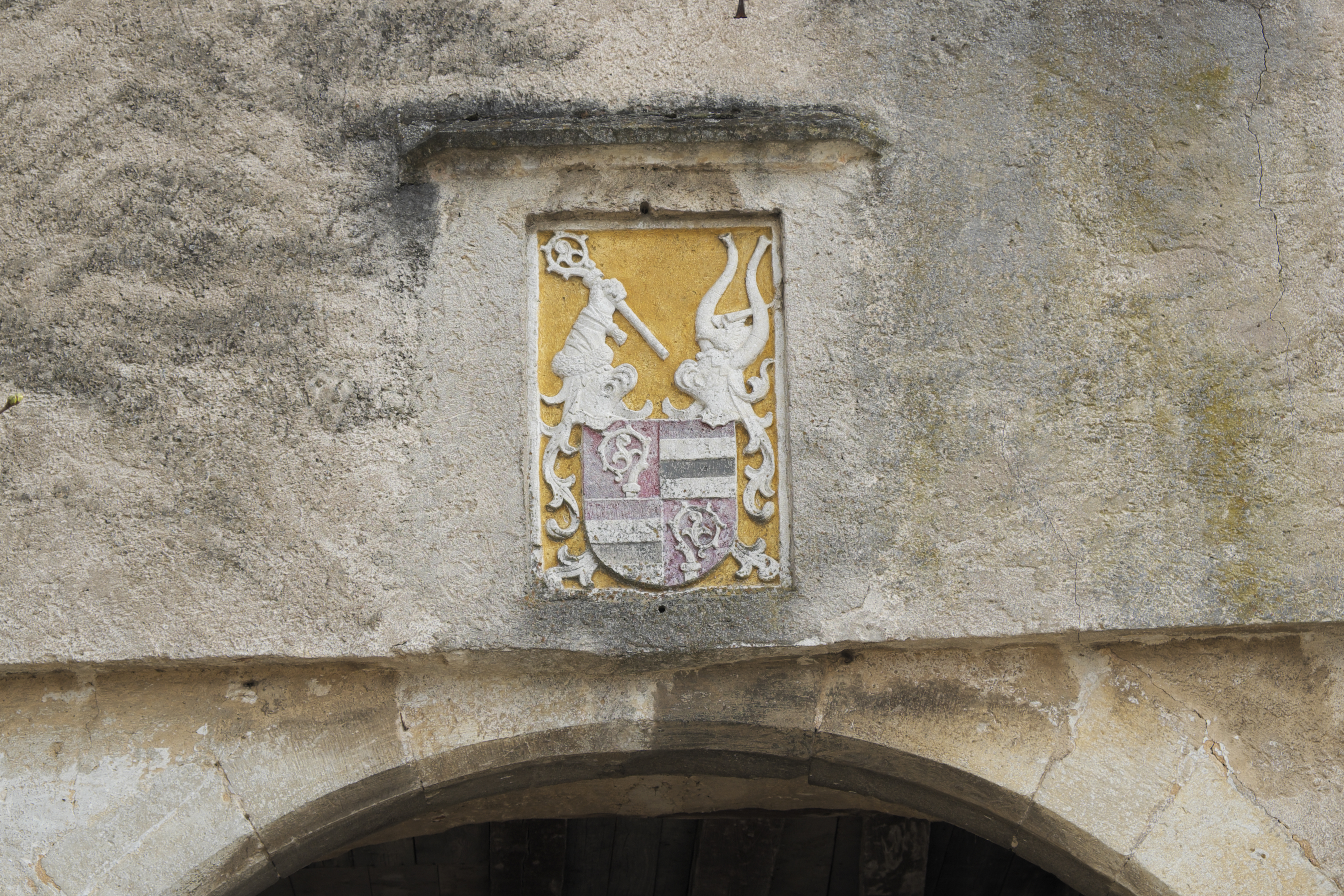 Wappen an Stadttor in Dollnstein im Landkreis Eichstätt (Oberbayern/Bayern). Wappen des Eichstätter Bischofs Wilhelm von Reichenau.